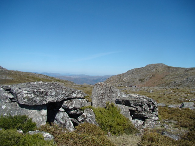 Casarotas na Serra Amarela - Terras de Bouro / Portugal